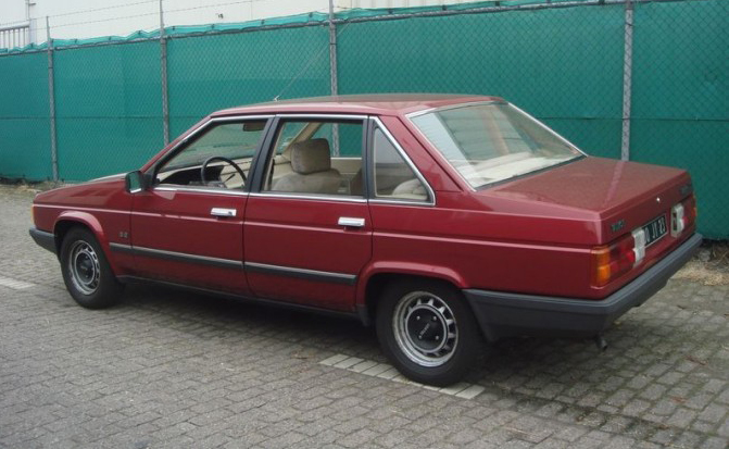 1983 Talbot Tagora 2.2 GLS